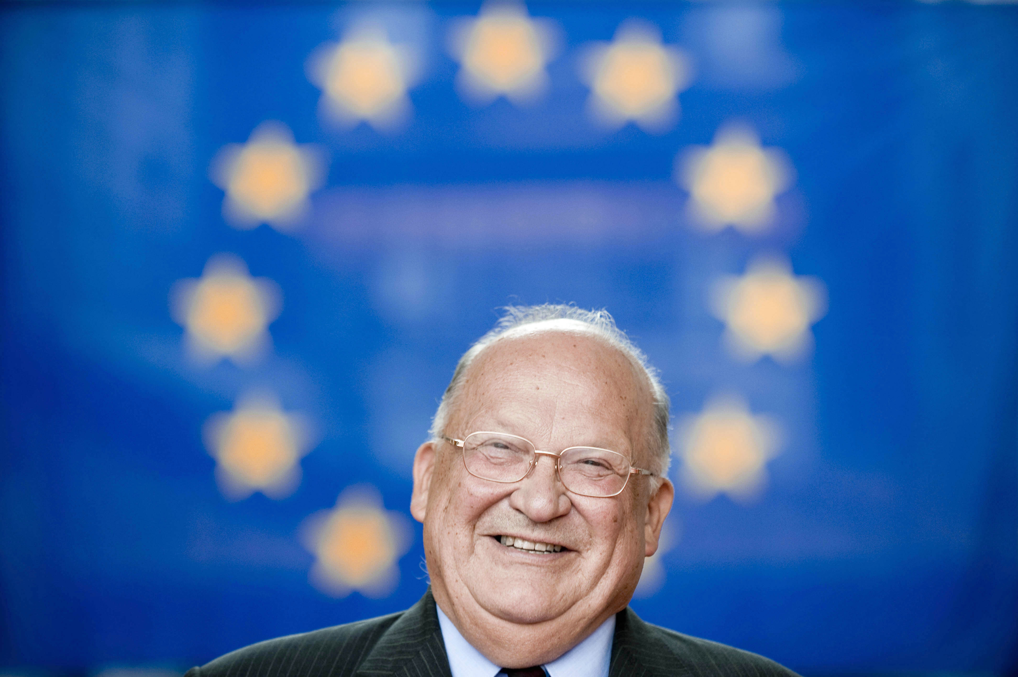 Jean-Luc Dehaene, Belgisch politicus.